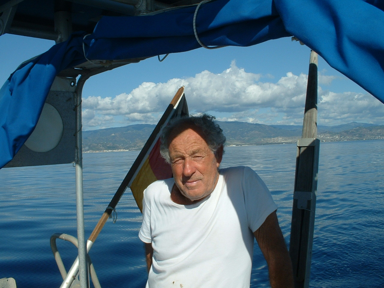 Tross in navigazione a bordo dell'Orso Grigio